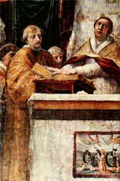 Leo III legt de eed af. Fragment van een muurschildering van Rafael.